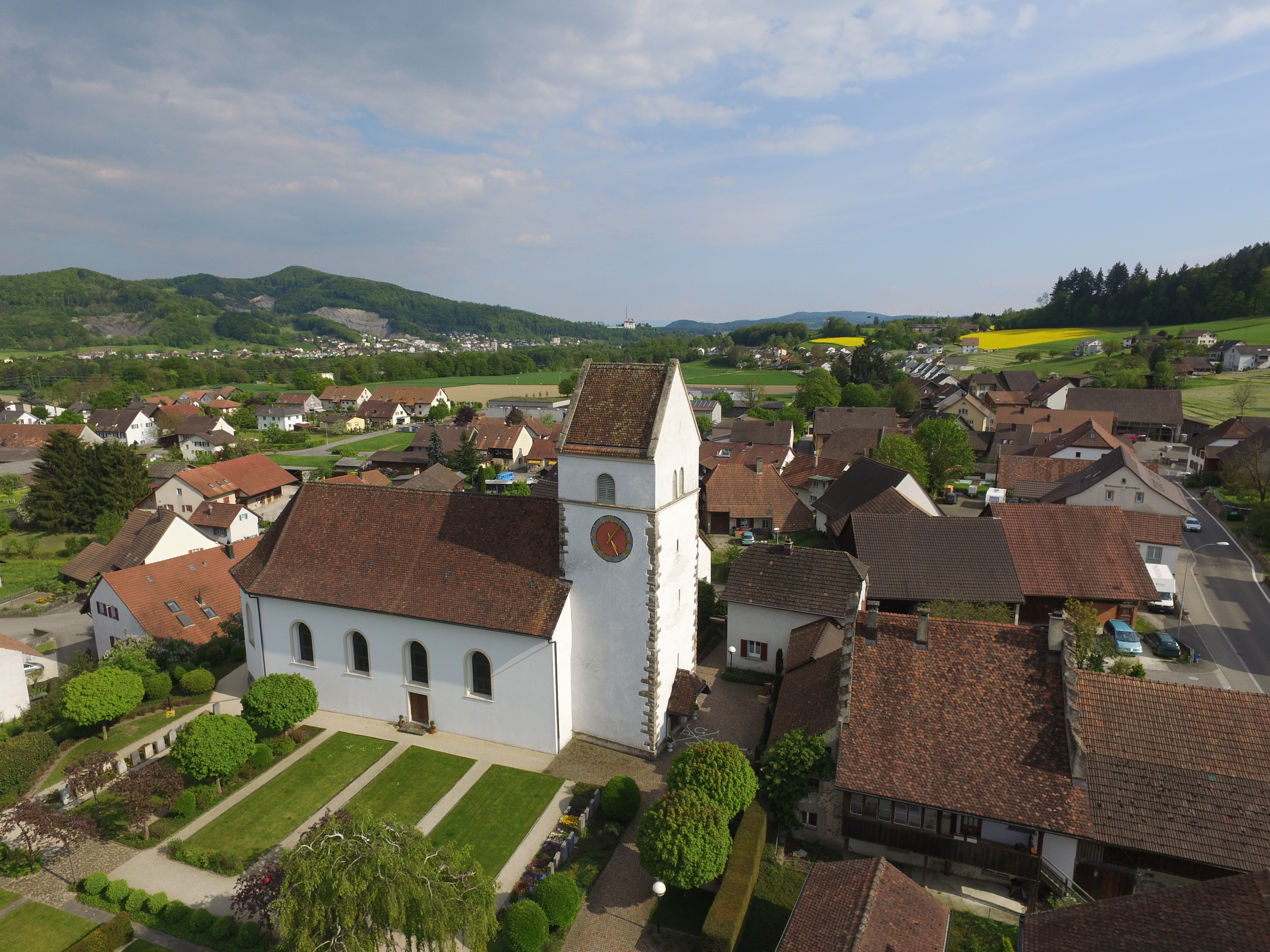 Jurapark Aargau, Reformierte Kirche Veltheim